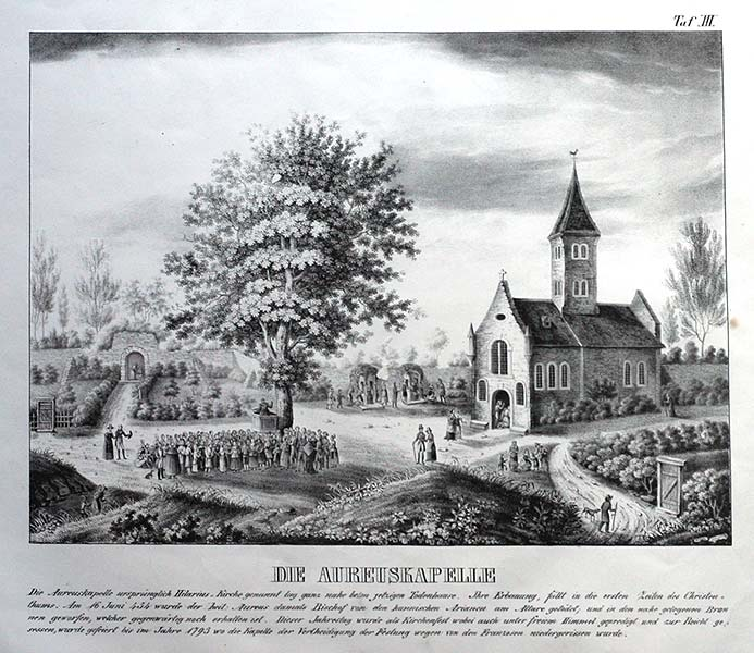 Aureuskapelle Mainz-Zahlbach, zerstört 1793. Litho von 1842